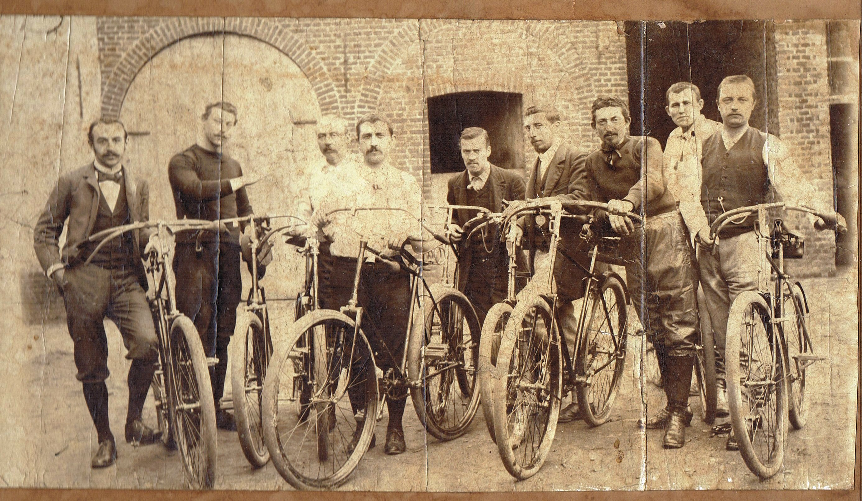 Wielerclub Lichtervelde. Deze foto is genomen op de binnenkoer van brouwerij De Hoop. De derde van links is Theophile Labens, de uitbater